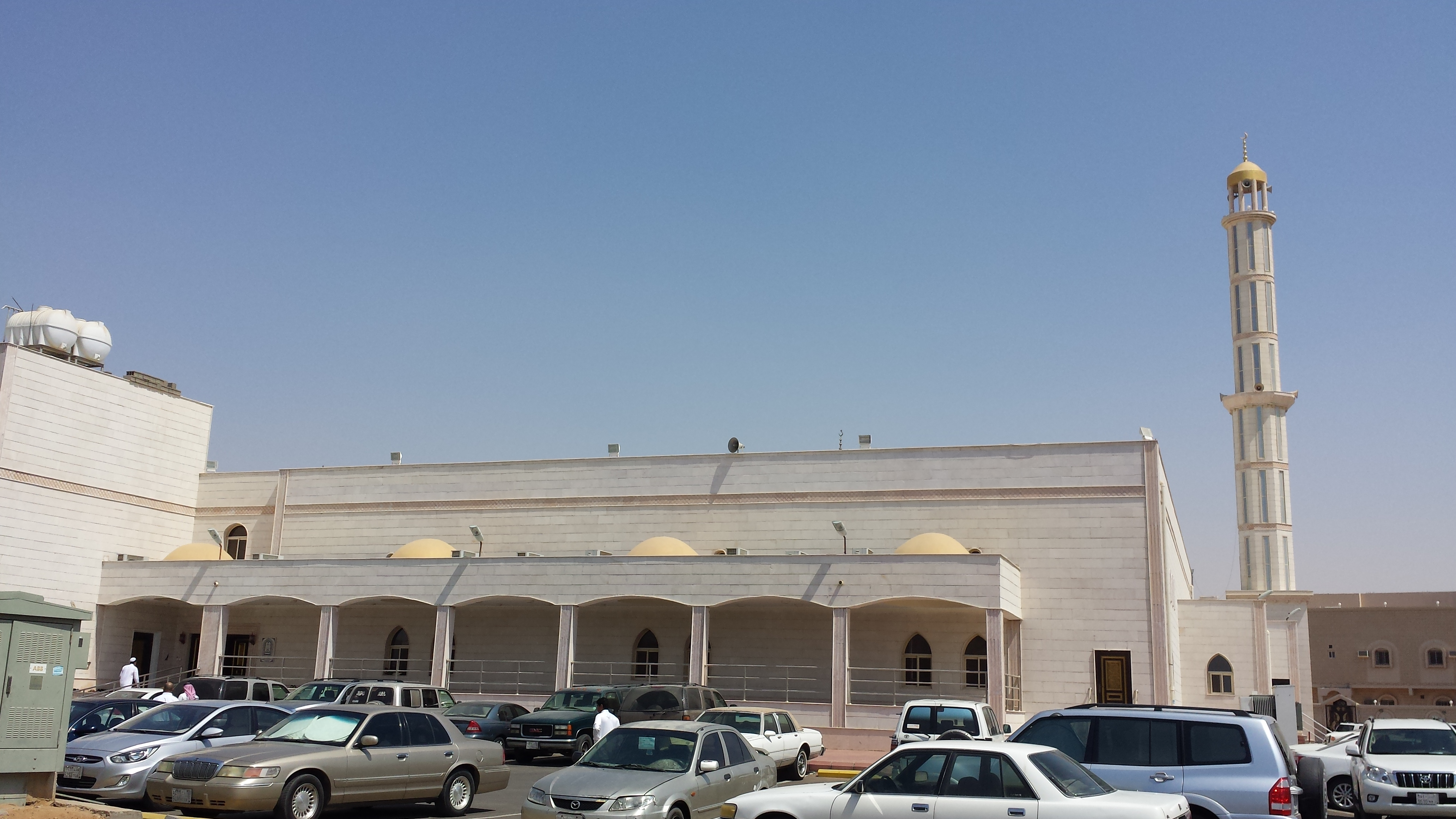 مسجد ابن باز